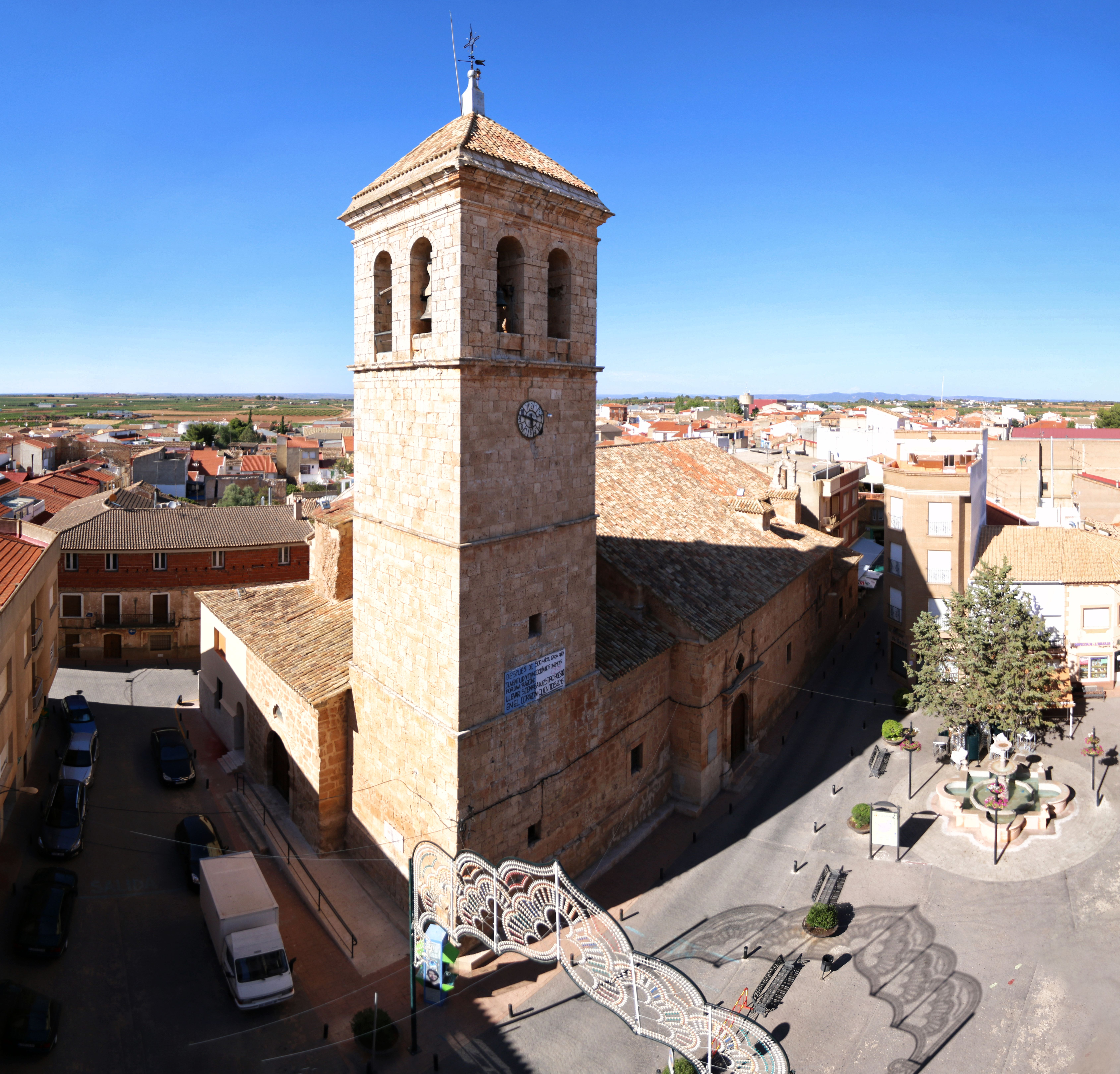 Parroquia Nuestra Señora de la Anunciación - IV